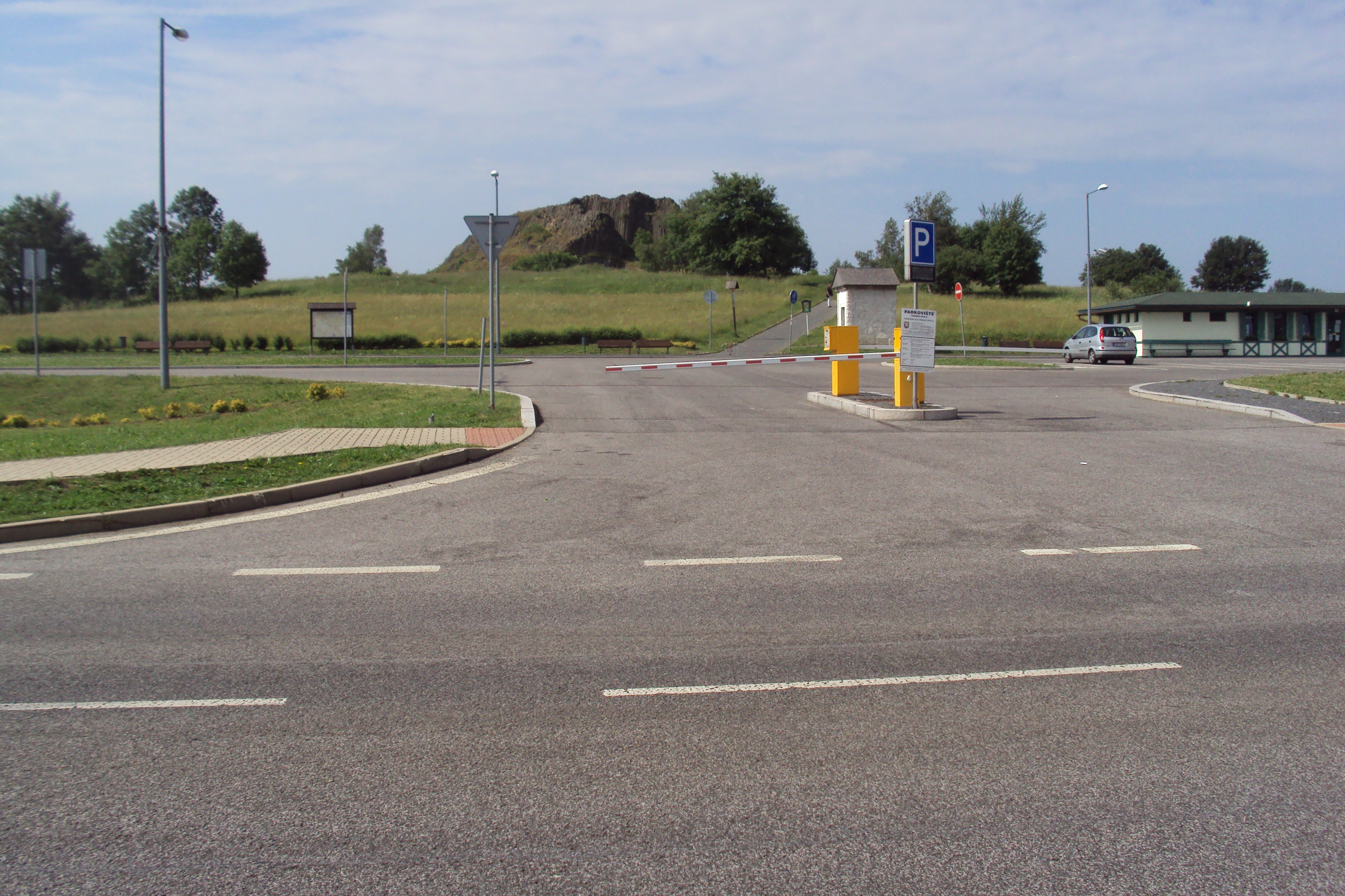 Parkoviště pod Panskou skalou v Práchni